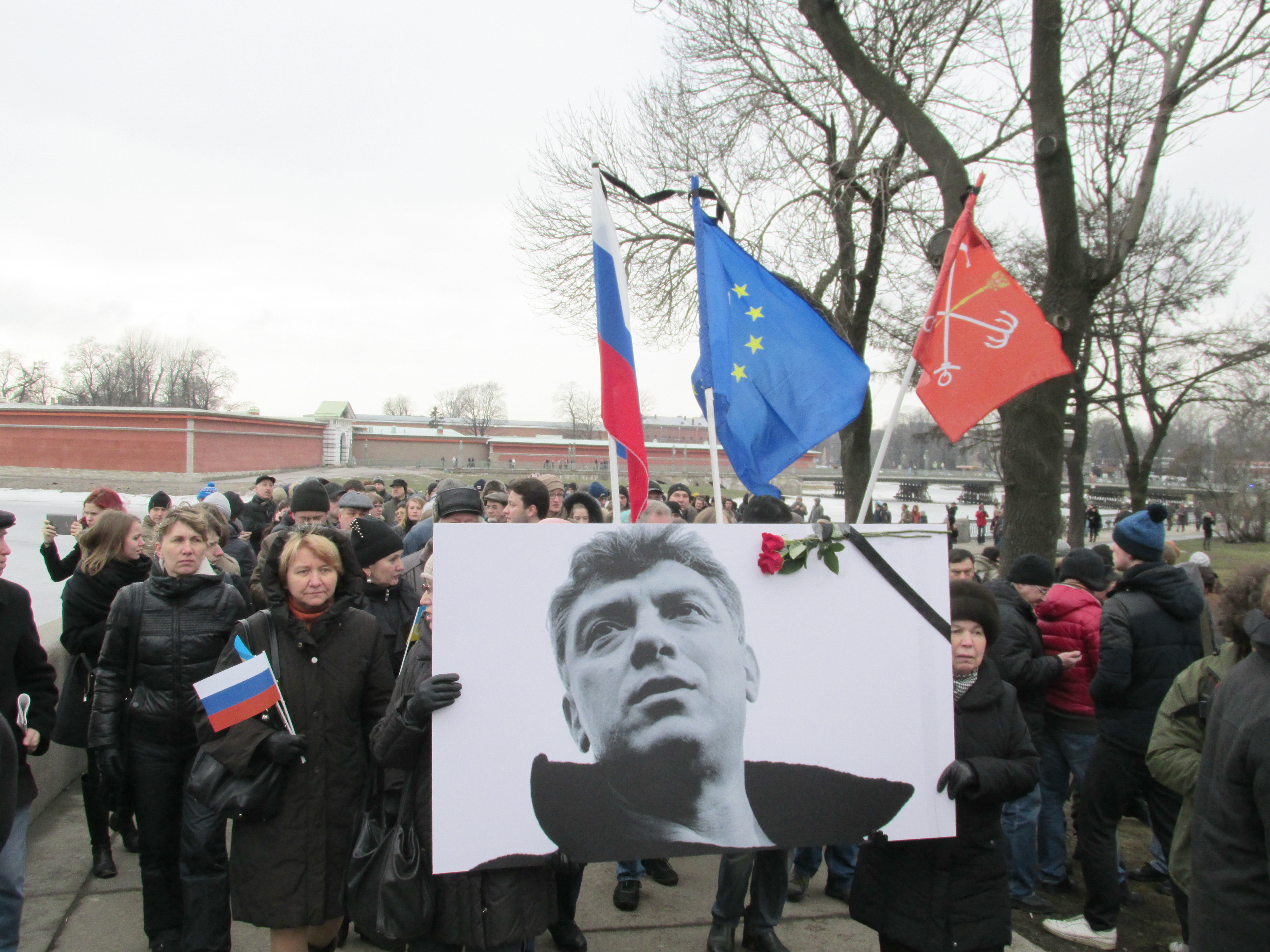 Траурное шествие памяти Бориса Немцова. Санкт-Петербург. 1 марта 2015 года